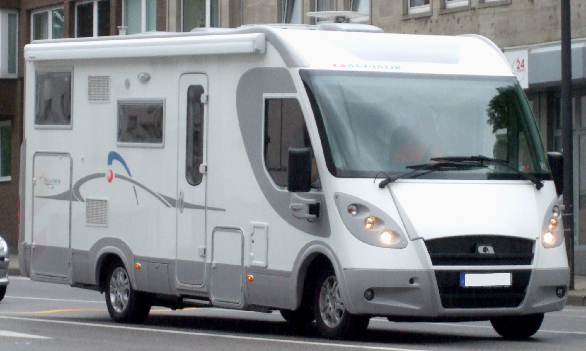 integriertes Wohnmobil Adriatik Vision I 707 SG, 4 Schlafplätze, 4 Sitzplätze, Abmessung (LBH): 720 cm, 230 cm, 300 cm, Baujahr ~ 2008, Heckgarage, Dieselmotor mit 107 KW, Zul. Gesamtgewicht 3850 Kg, Zuladung 580 Kg